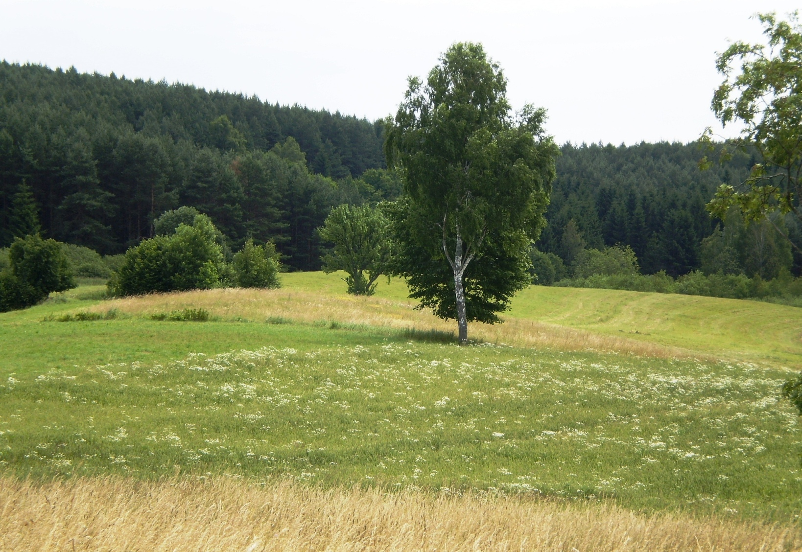 Vištytgirio miškas, Vištyčio RP, Vilkaviškio raj.